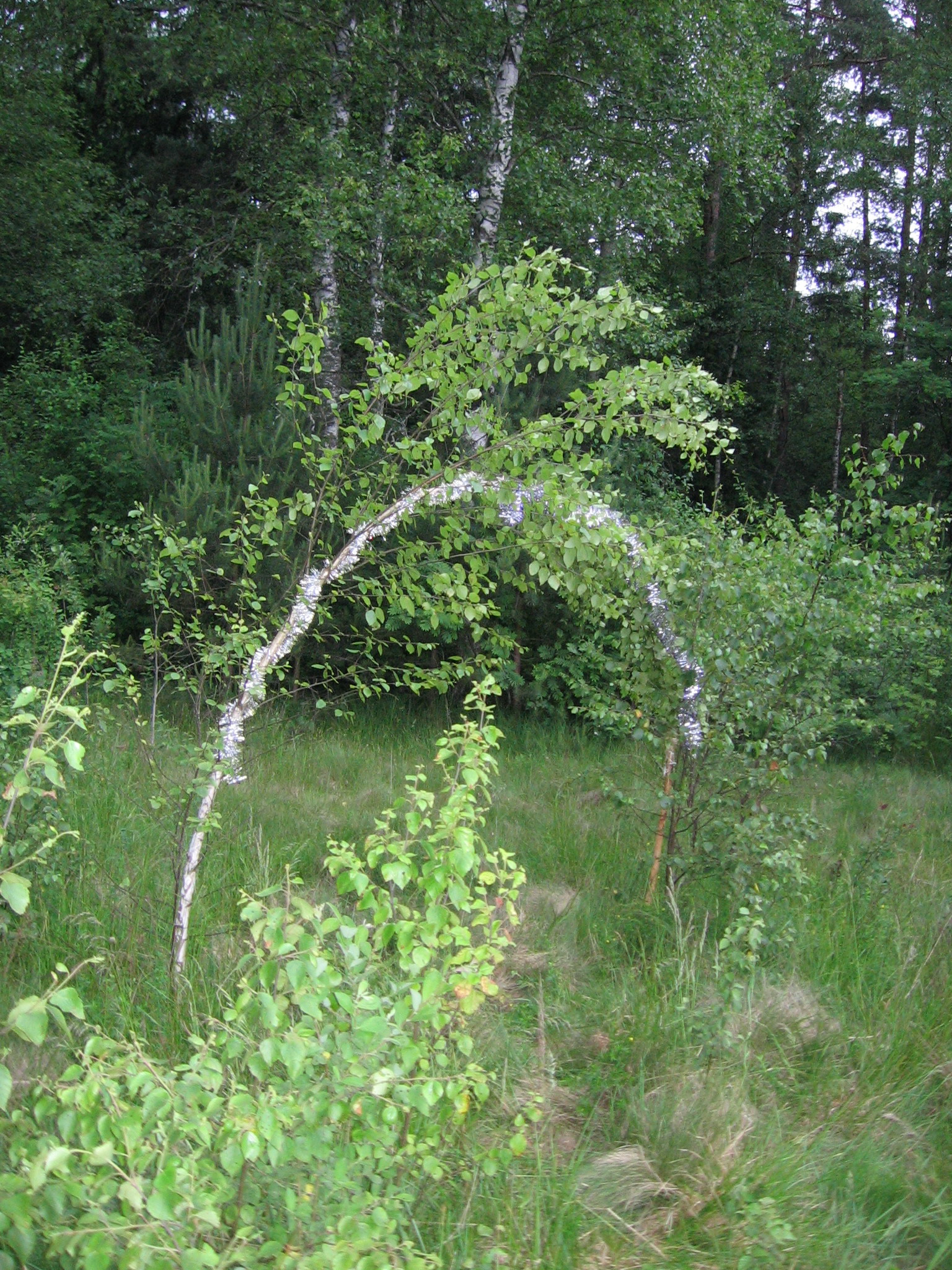 Арка из берёзок для кумления на девичьих гуляниях. Беларусь, Воложинский район, 2008 год